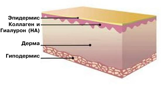 гиалуриновая кислота